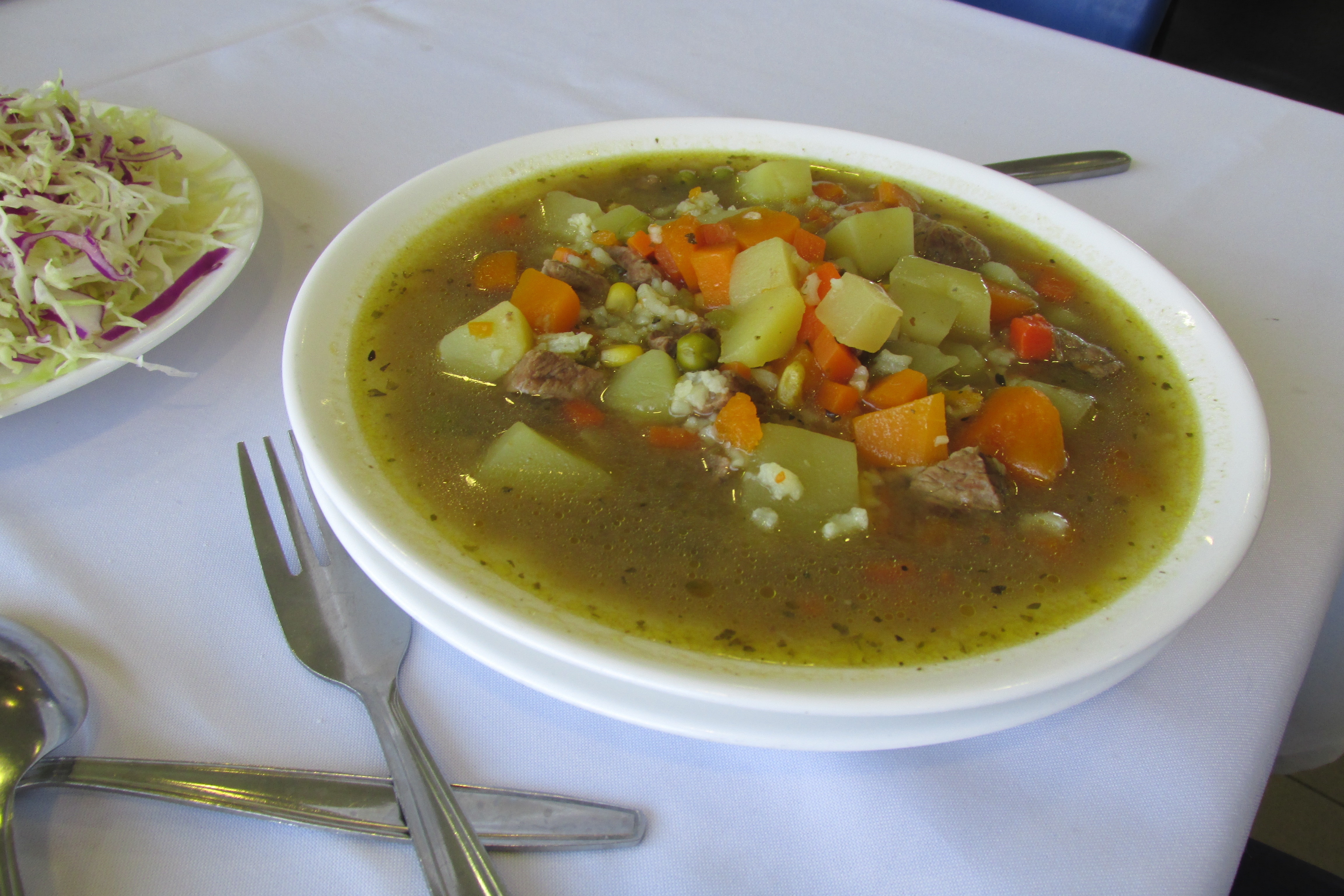 Guiso de carbonada